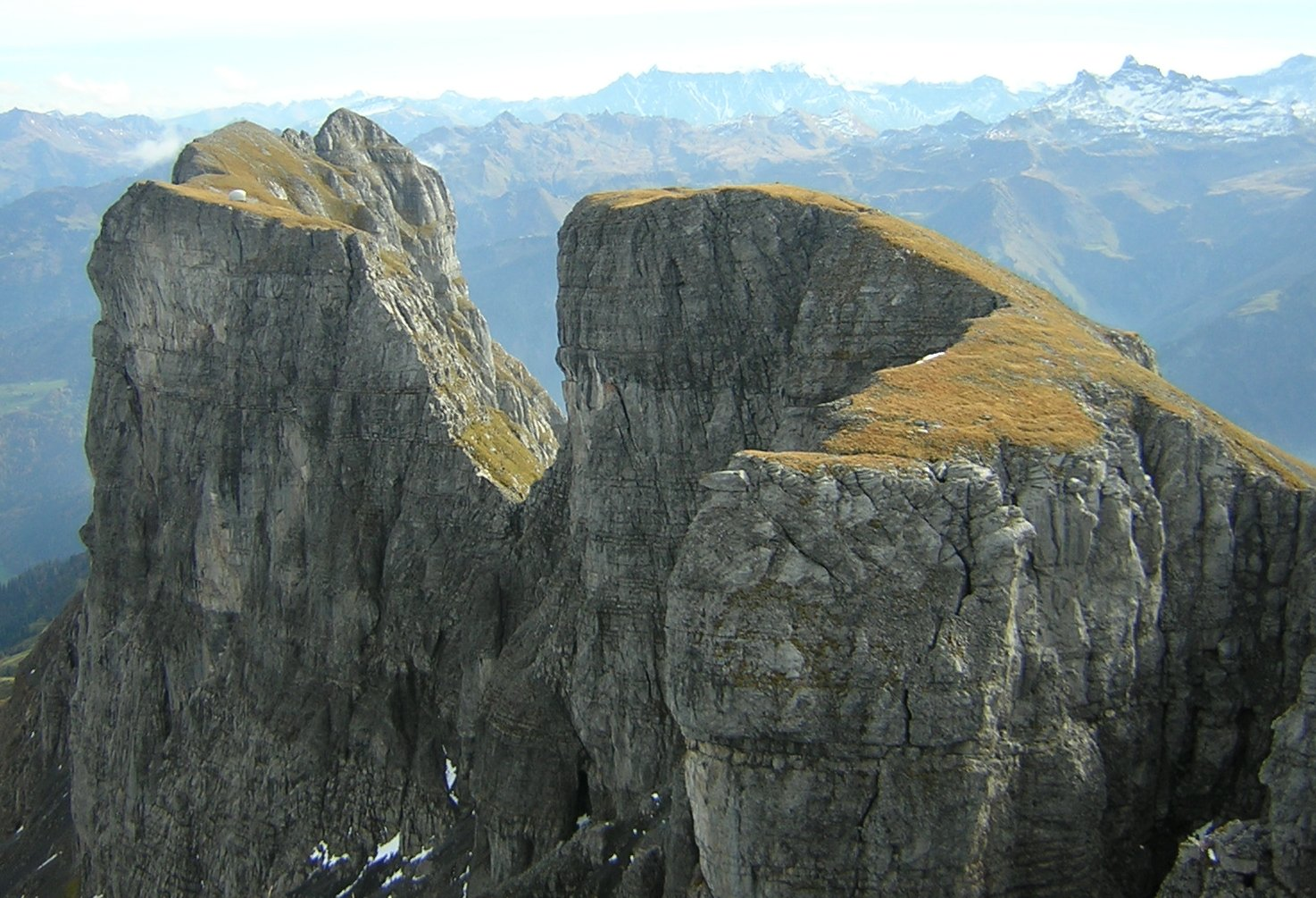 The Eggstöcke (Hinter Eggstock, Mittler Eggstock and Vorder Eggstock) in the Glarus Alps, seen from Hinter Eggstock